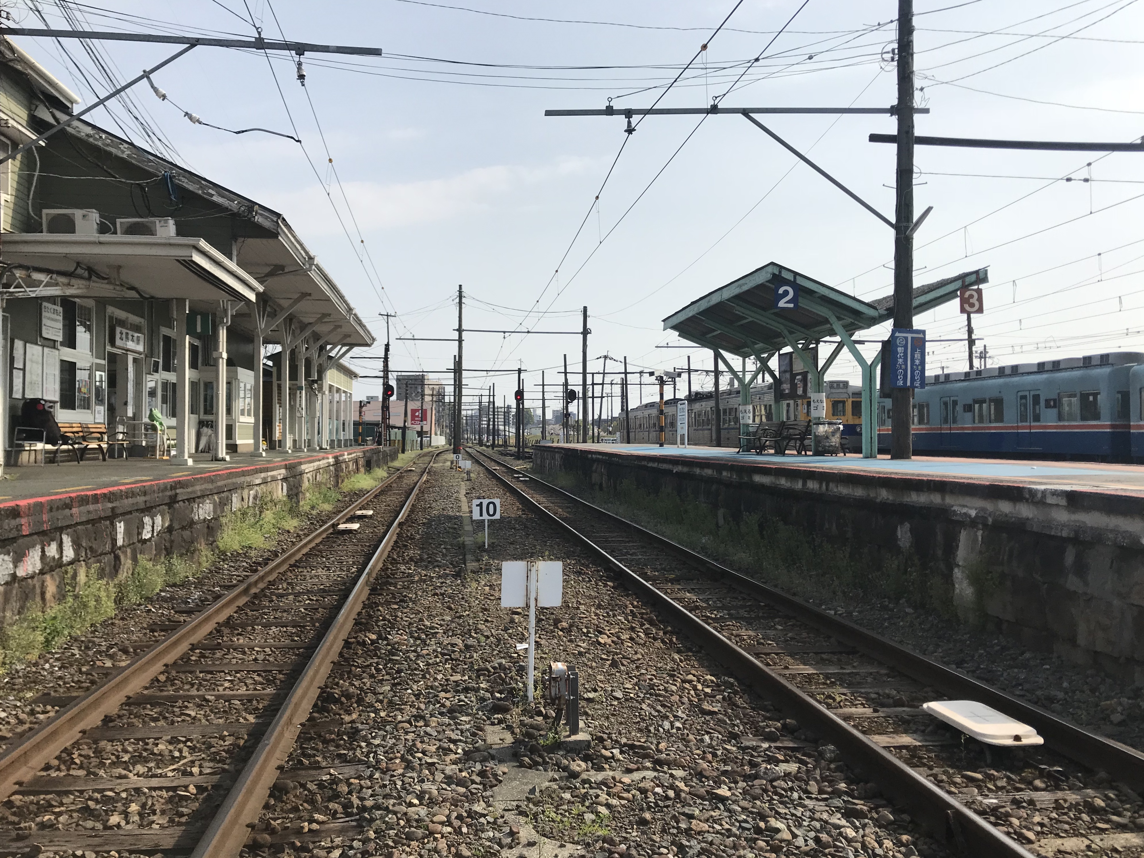 北熊本駅の構内踏切より望むホーム(奥は坪井川公園・黒髪町方面)